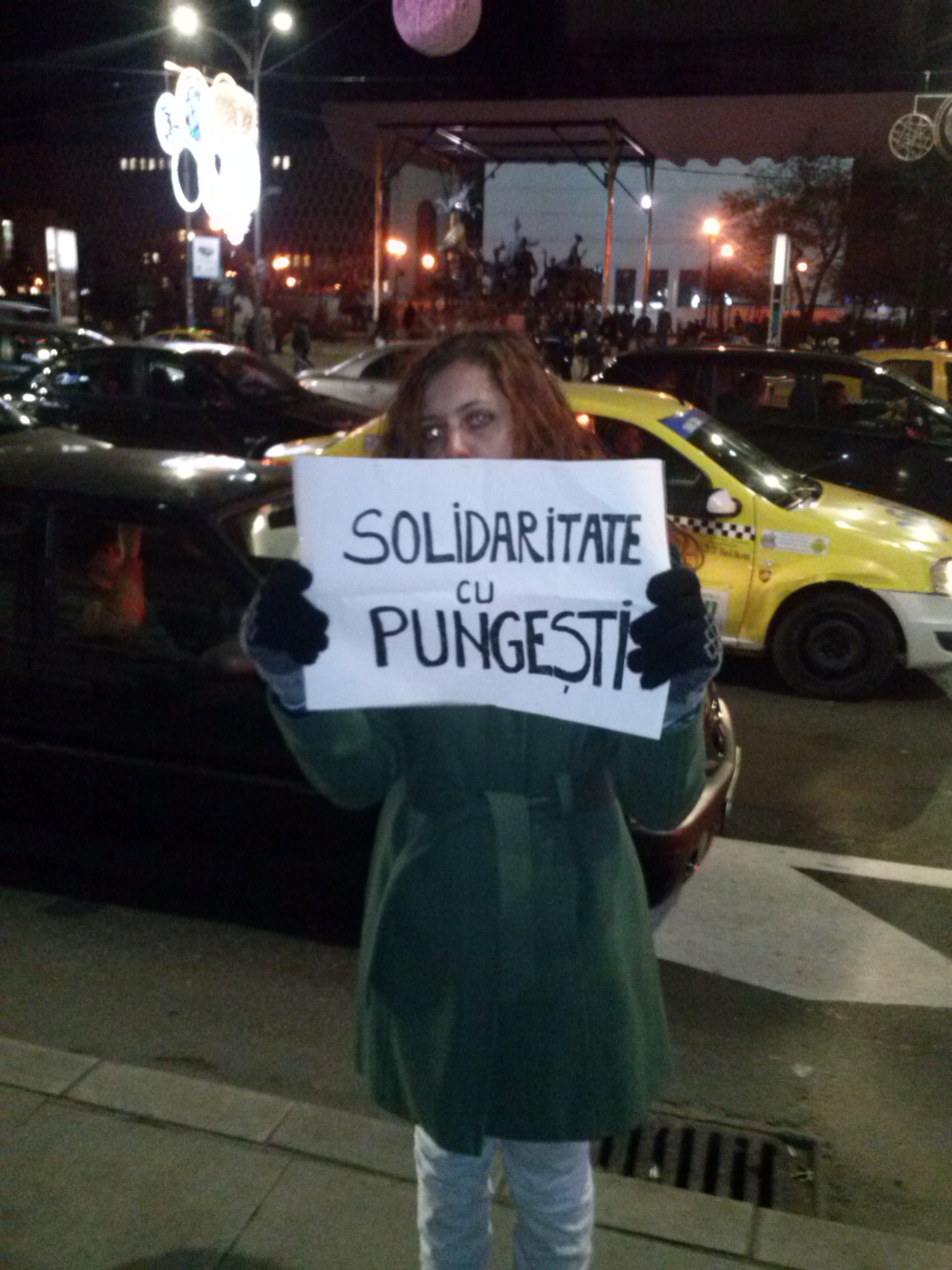 Protest solidaritate Pungești 7.12.2013